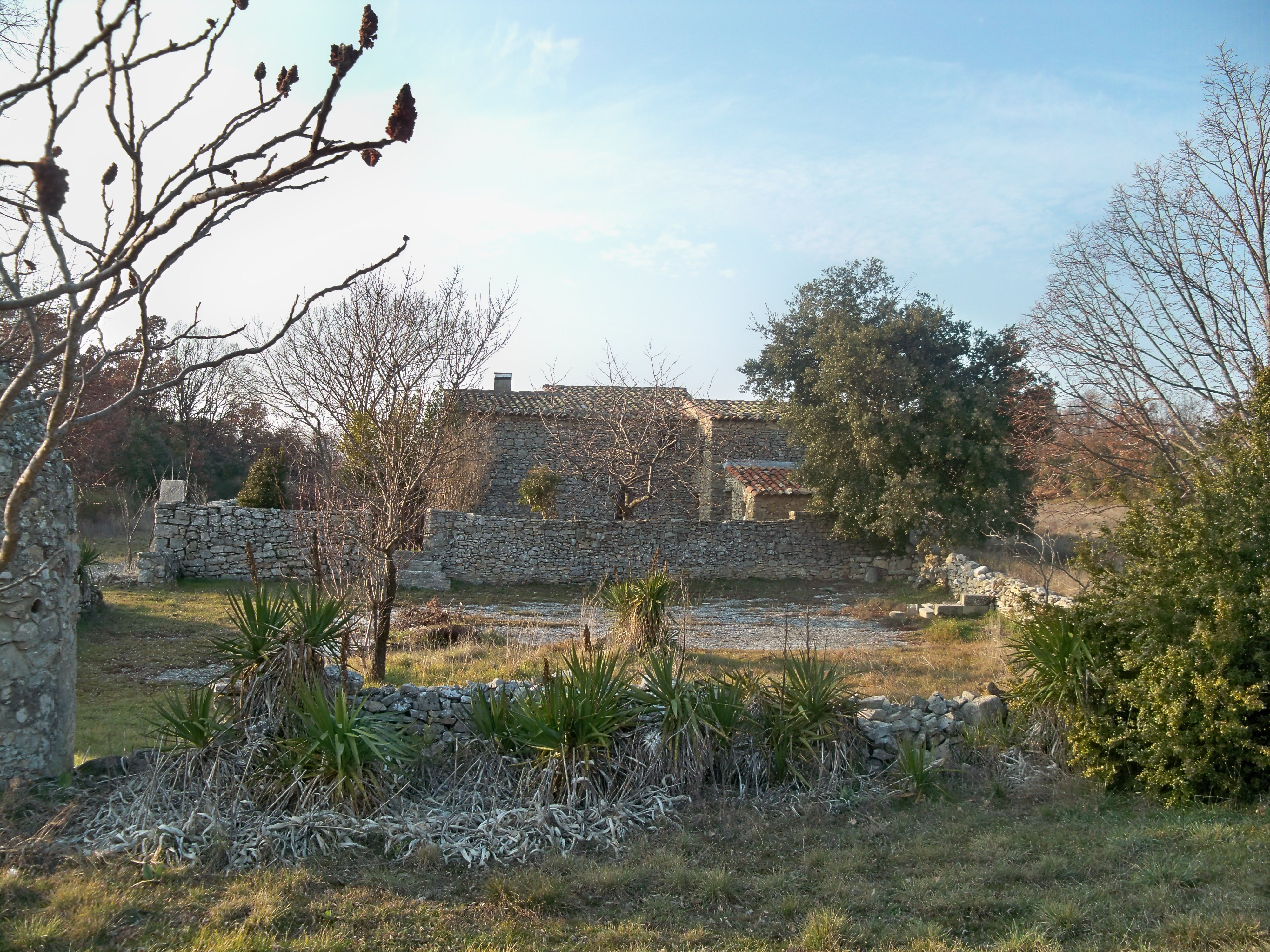 Maison à Terre à Apt, Vaucluse, France